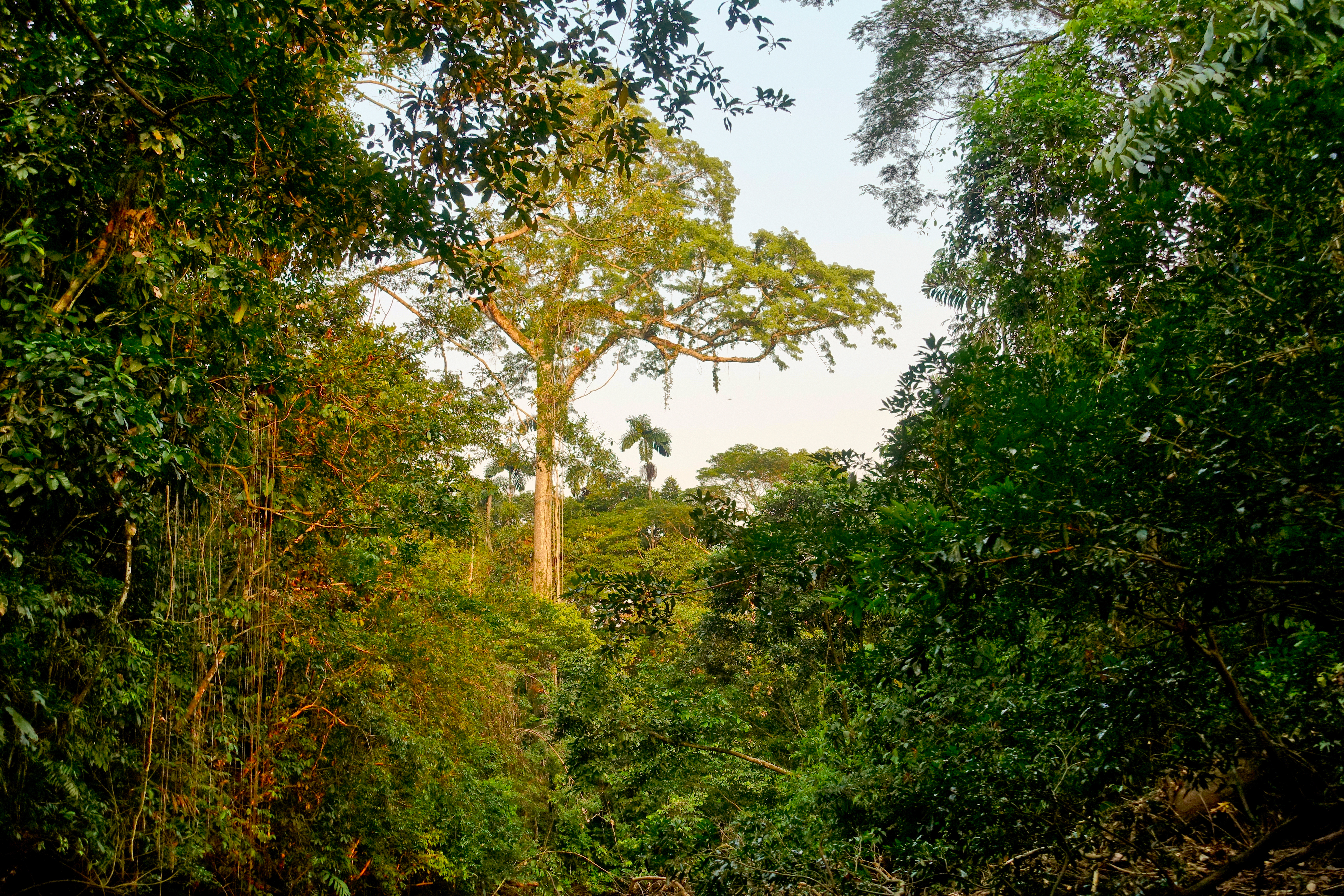 Regenwald mit Überhälter (Kapok-Baum), Cuyabeno Wildtier-Reservat, Ecuador